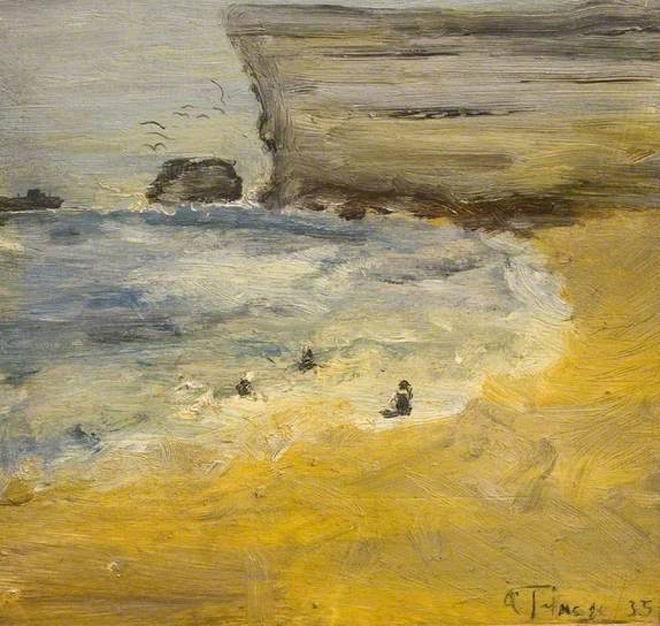 Título: Marina - óleo sobre tabla - Alto: 29 cm- Ancho: 29 cm. - Bushey Museum and Art Gallery